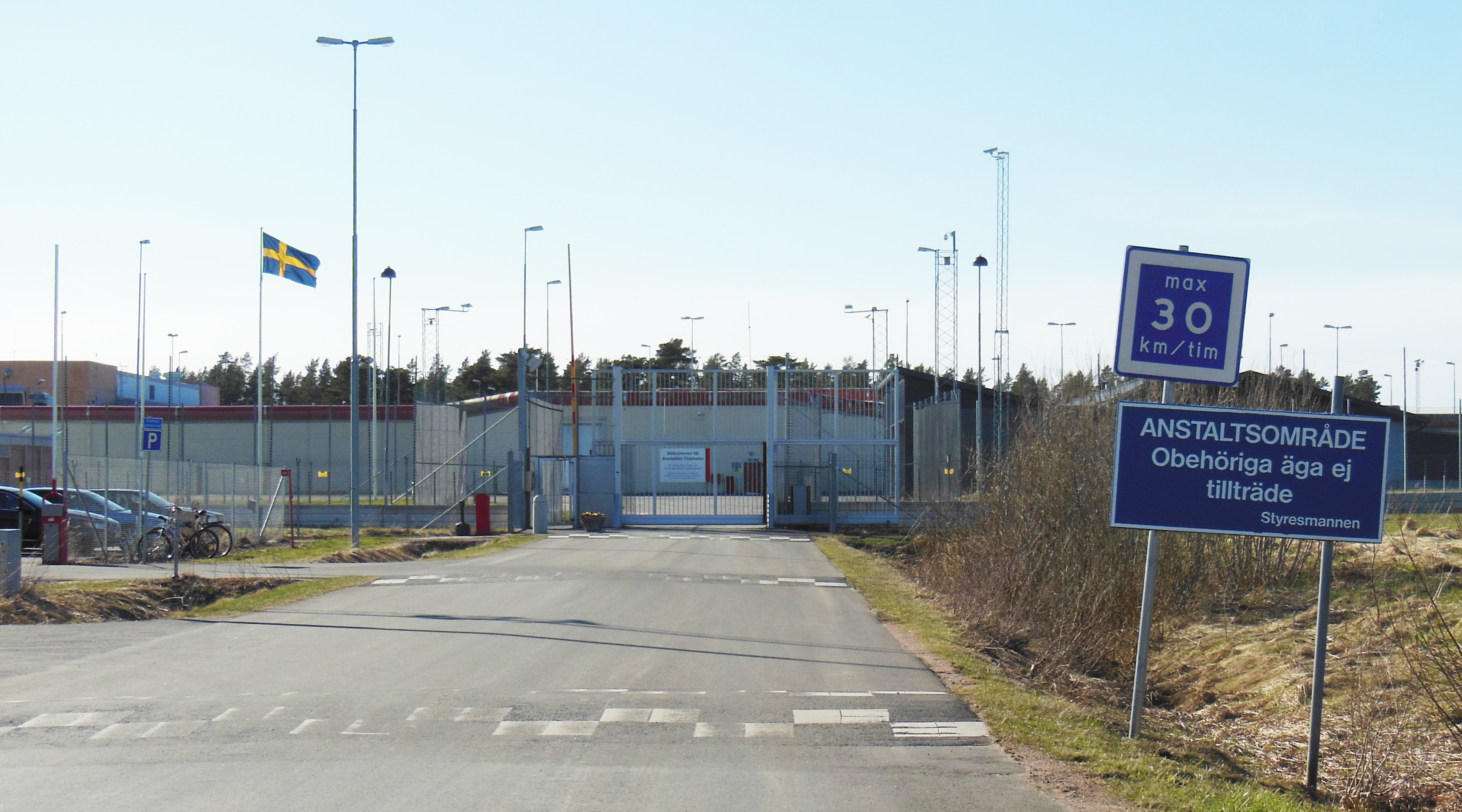 Anstalten Tidaholm 1 maj 2013.